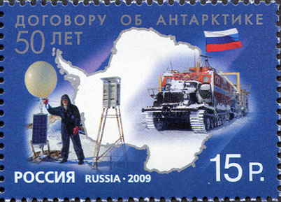 Договору об Антарктике 50 лет.